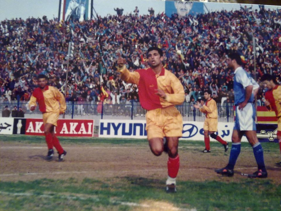 لاعب كرة قدم